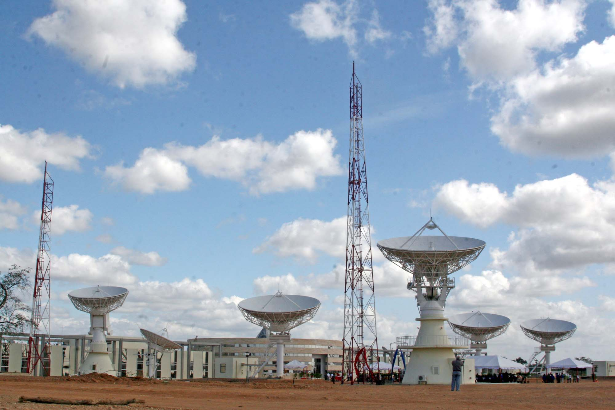 Entrega del control operacional del Satélite Simón Bolívar por parte de la Republica Popular China a la República Bolivariana de Venezuela.